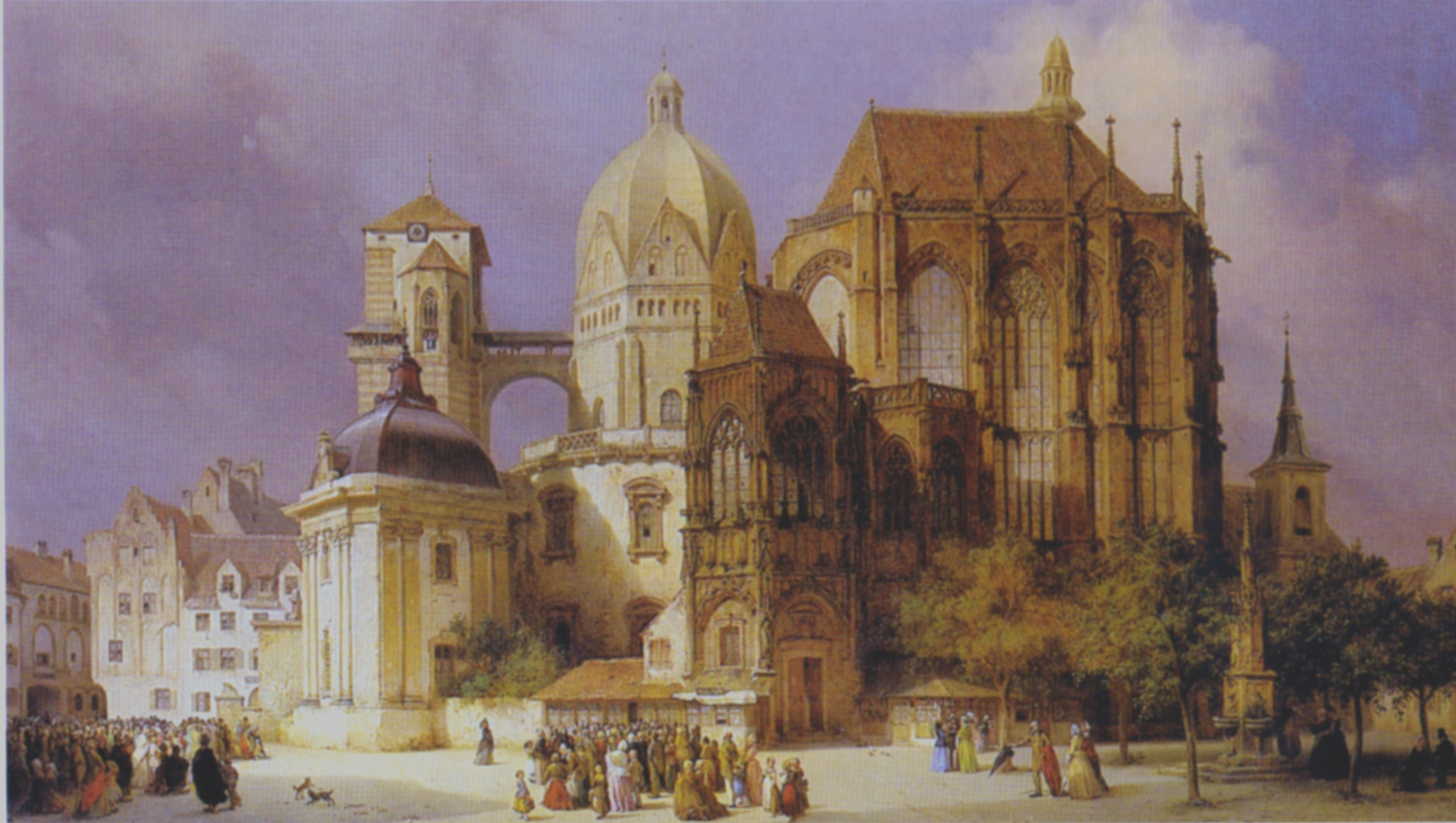 Michael Neher: Der Dom zu Aachen, 1853 (Zeigung der Heiligtümer) Zustand nach dem barocken Umbau (barocker Ungarnkapelle, barocke Fensterleibungen am Oktogon und barockem Türsturz der Annakapelle)